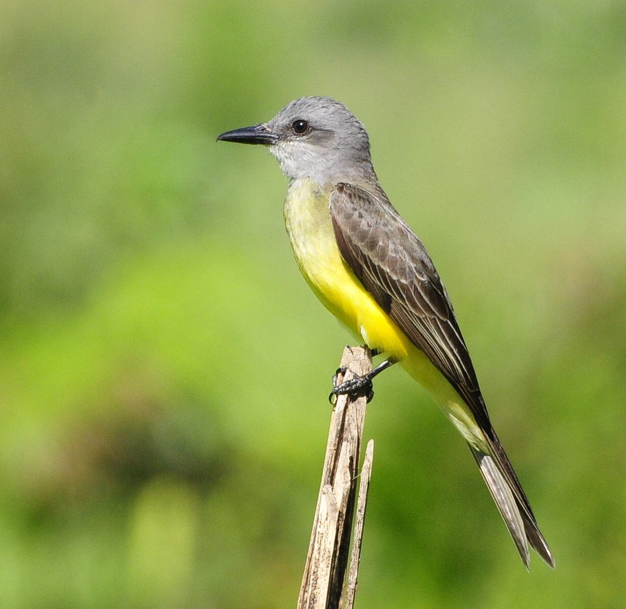 Lanchonete OASYS - Margem do rio Ribeira de Iguape - Registro-SP - Brasil